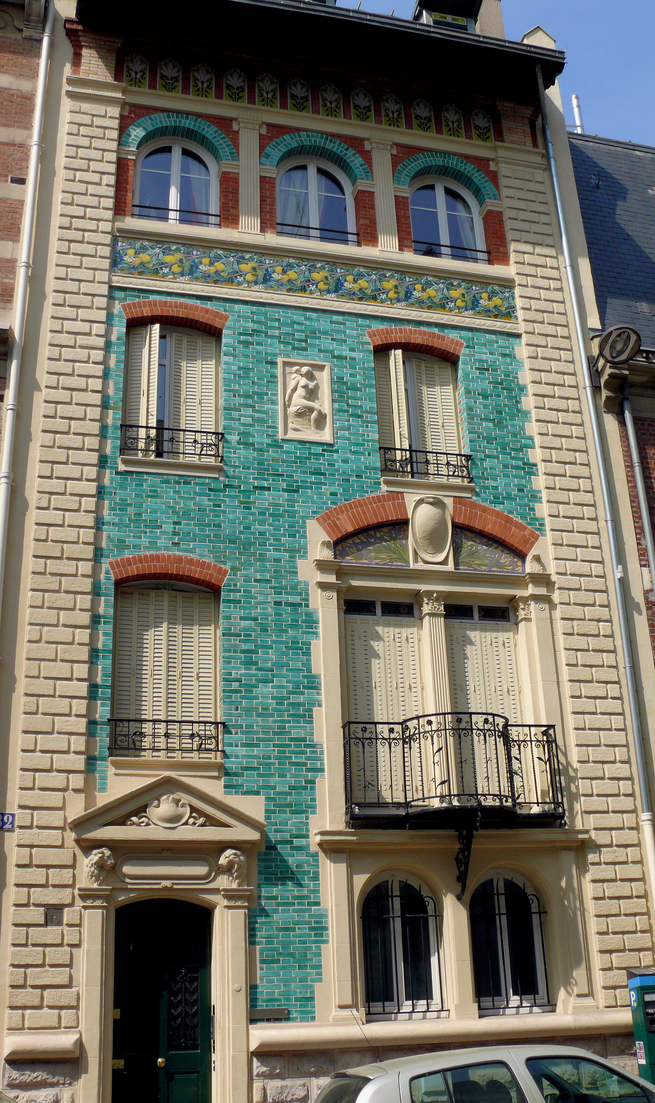 Paris 17ème arrondissement - Hôtel particulier 32 rue Eugène Flachat